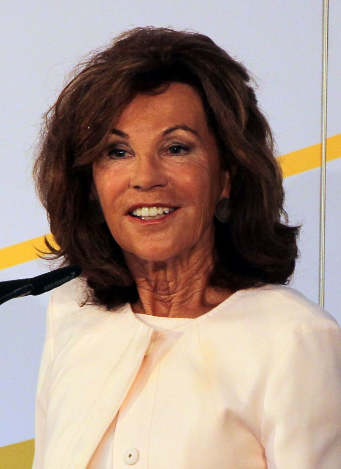 Europaforum Wachau 2019 auf Stift Göttweig